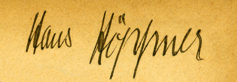 Unterschrift von Hans Höppner, Krefeld